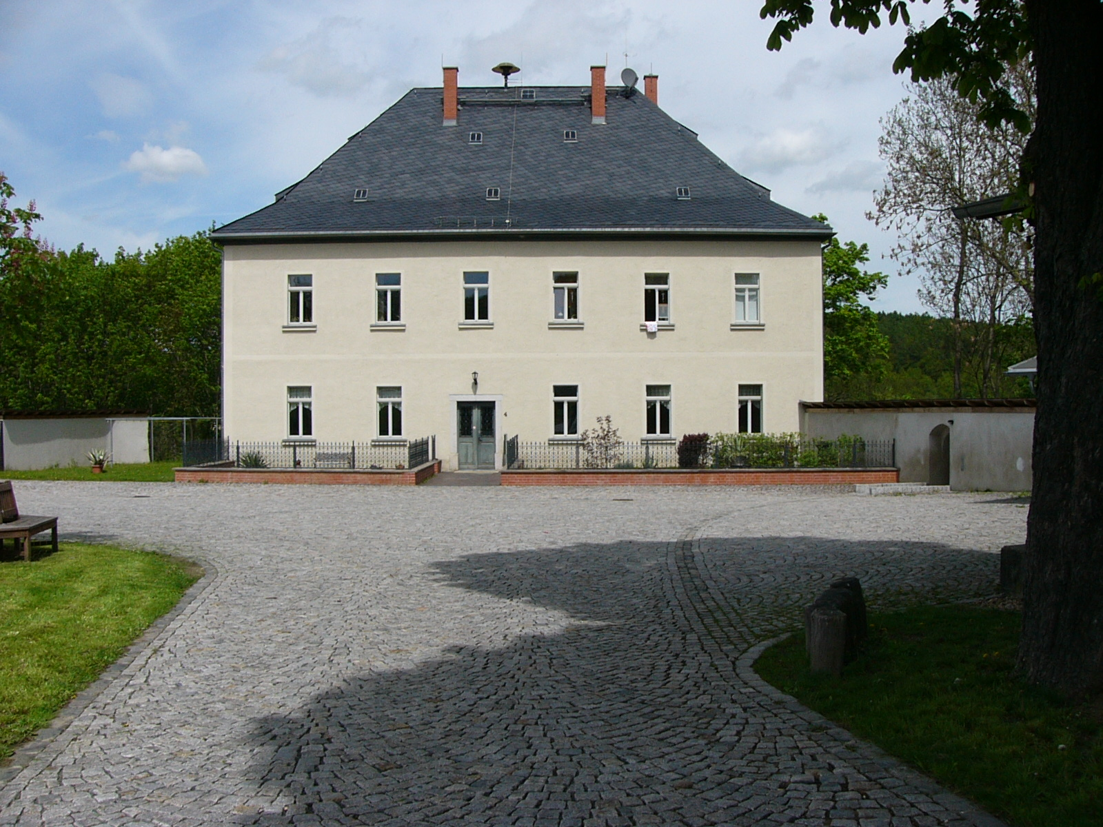 Rittergut Magwitz, Hauptgebäude